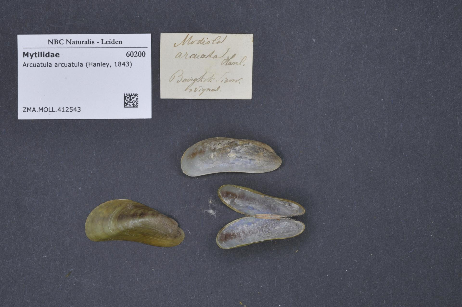 Arcuatula arcuatula (Hanley, 1843)